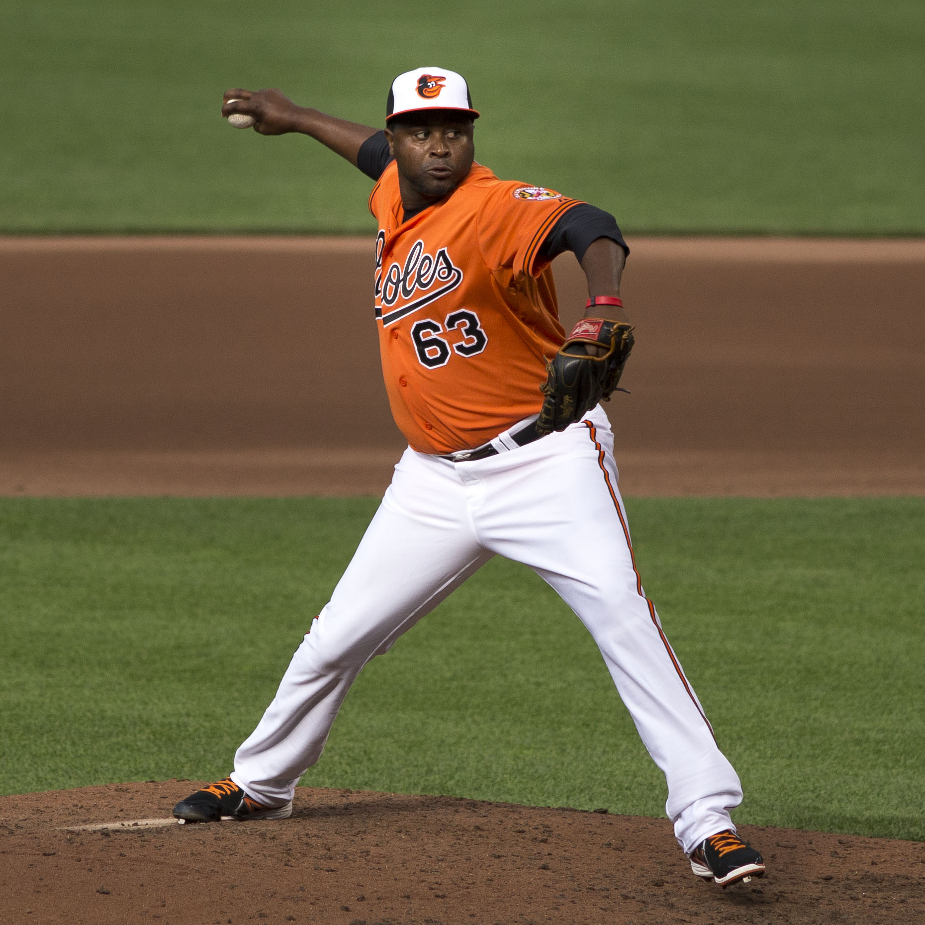 Jairo Asencio